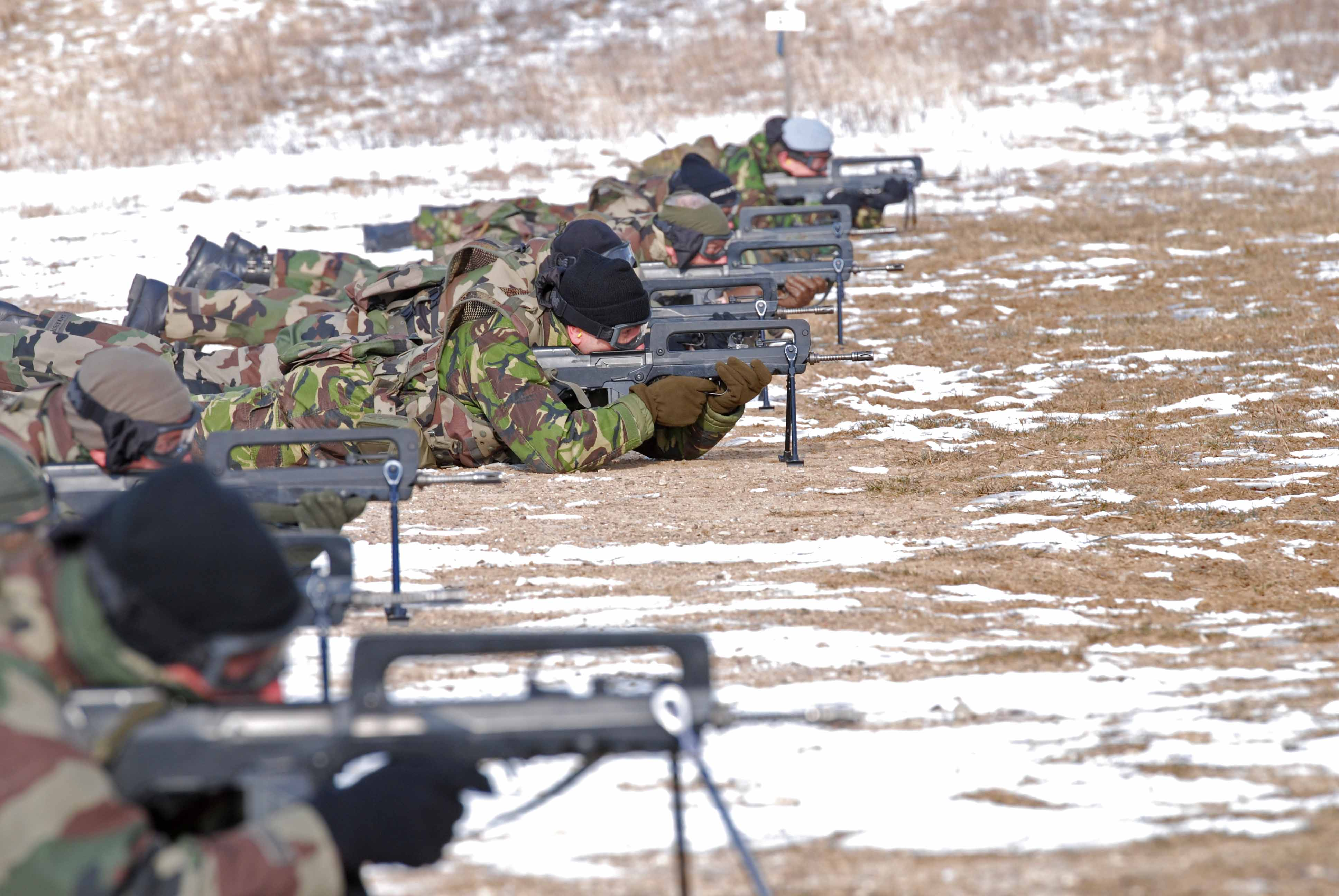 Entraînement au tir avec le fusil d'assaut « FAMAS » pour les officiers, sous-officiers et militaires du rang du corps de réaction rapide - France.